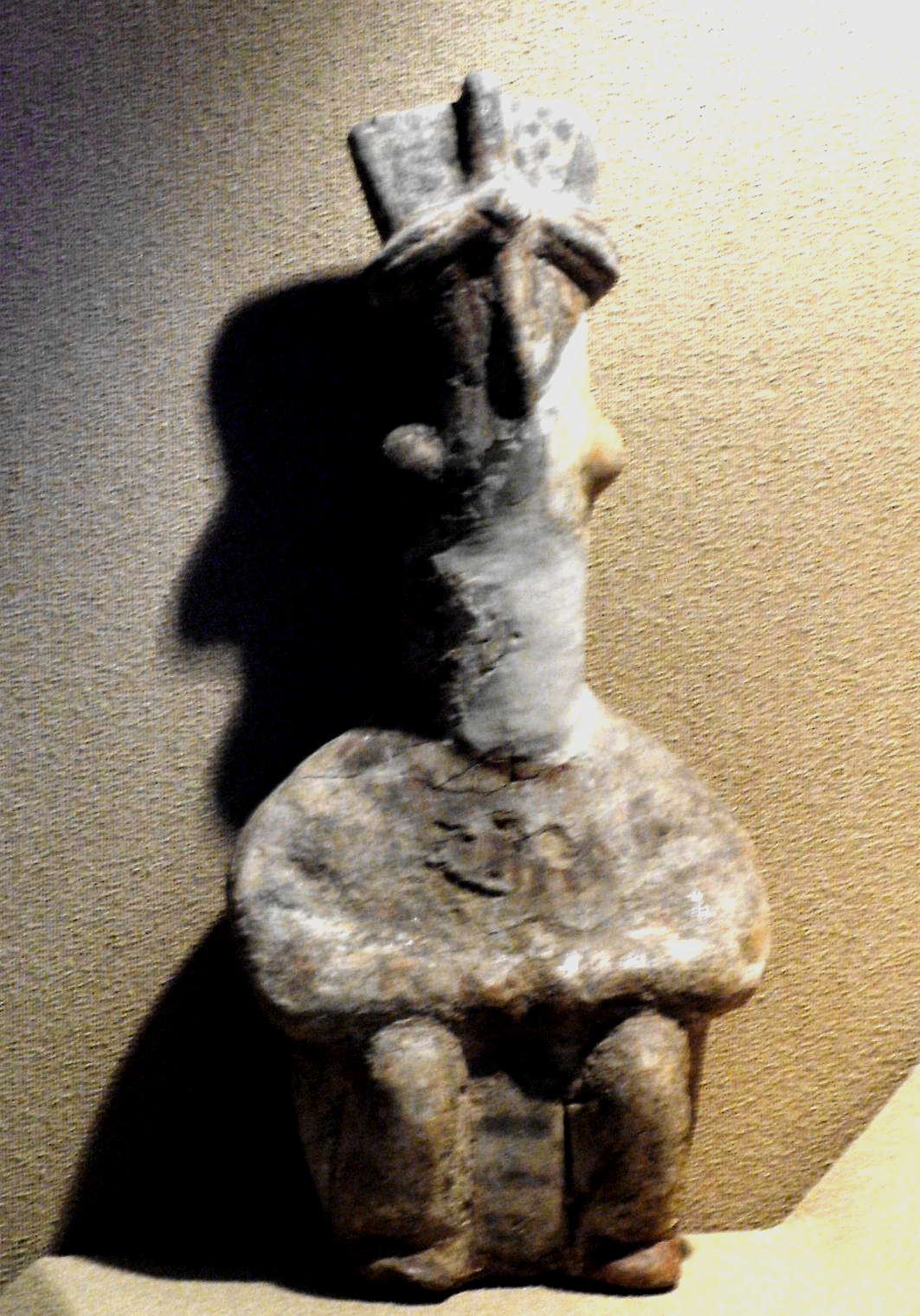 Nőidol, Hacilar (Anatóliai Civilizációk Múzeuma, Ankara, Törökország)